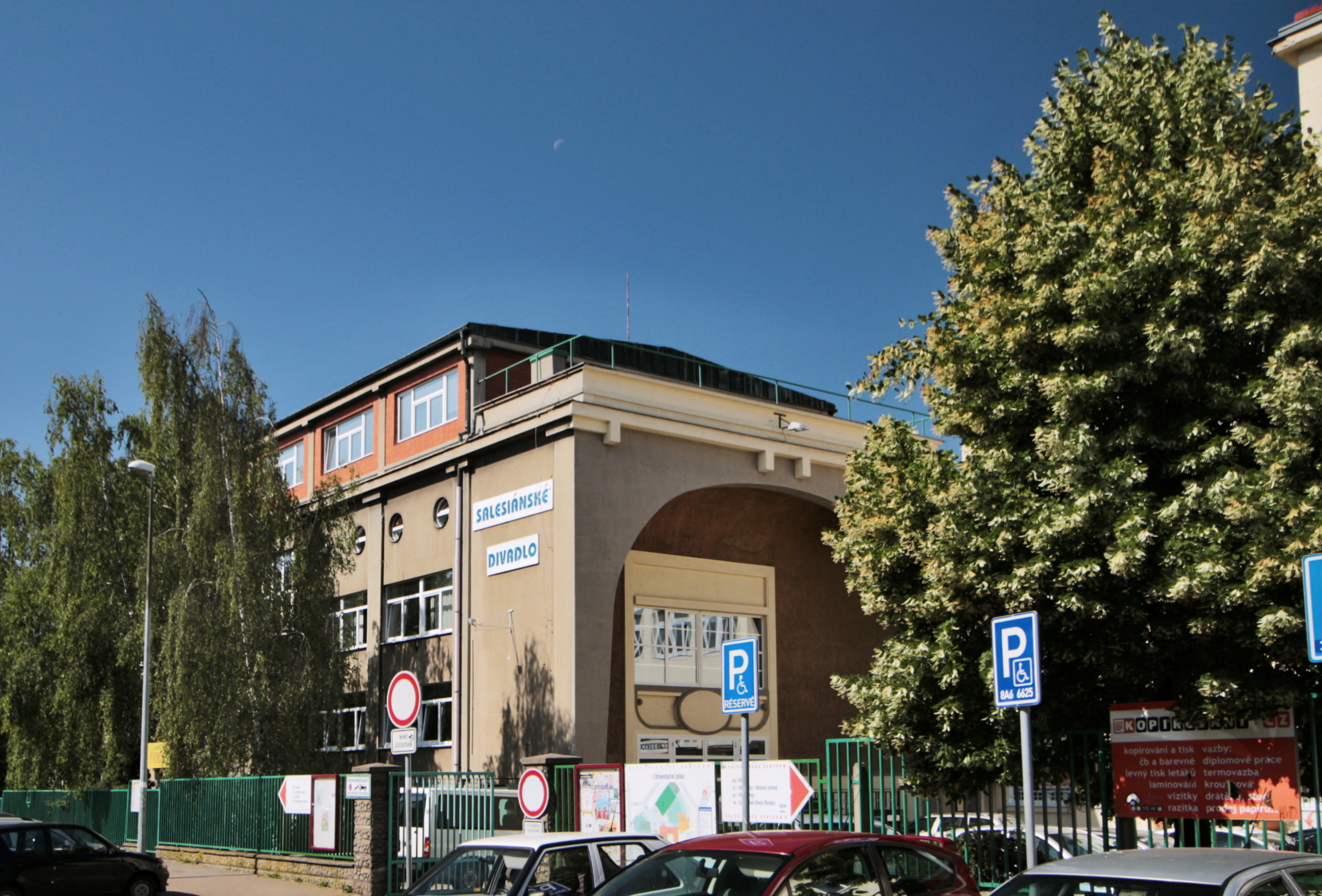 Salesiánské centrum Praha-Kobylisy